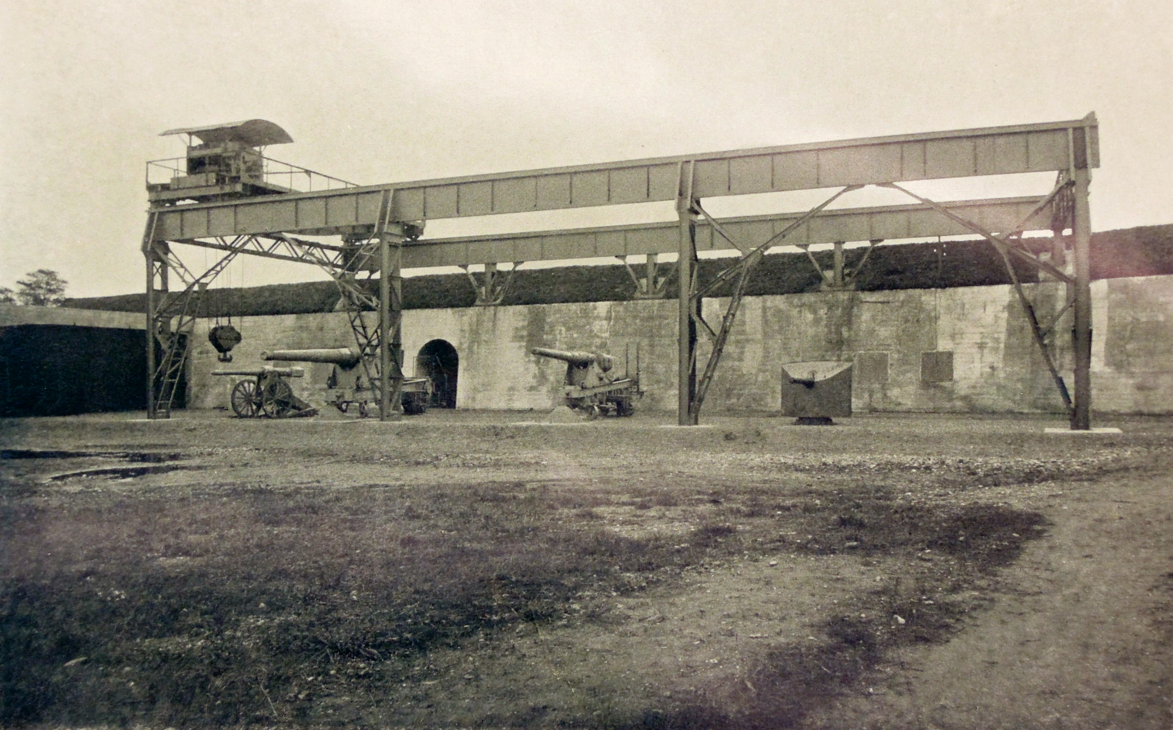 Ziel des neuen Schießstands der Dillinger Hütte. Im Hintergrund der Hüttenwald